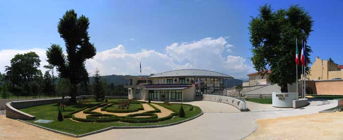 Mairie de Saint-Rambert-d'Albon, le jour de son inauguration